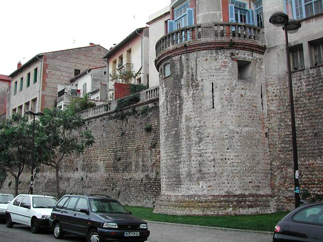 Remparts Boulevard Jean Bourrat (encore existants)à Perpignan. On voit l'appareil en arête-de-poisson signalé par Mérimée